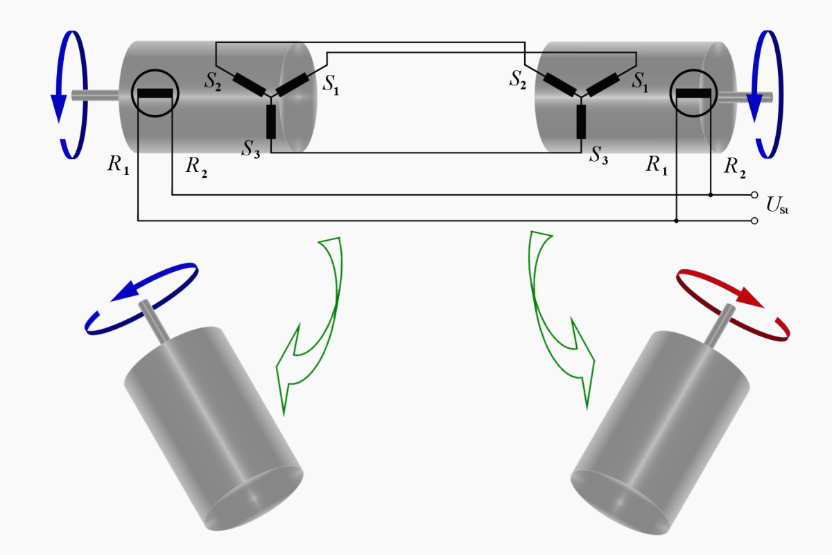 scheinbare Drehrichtungsänderung eines Drehmelders durch Änderung des Aspektwinkles